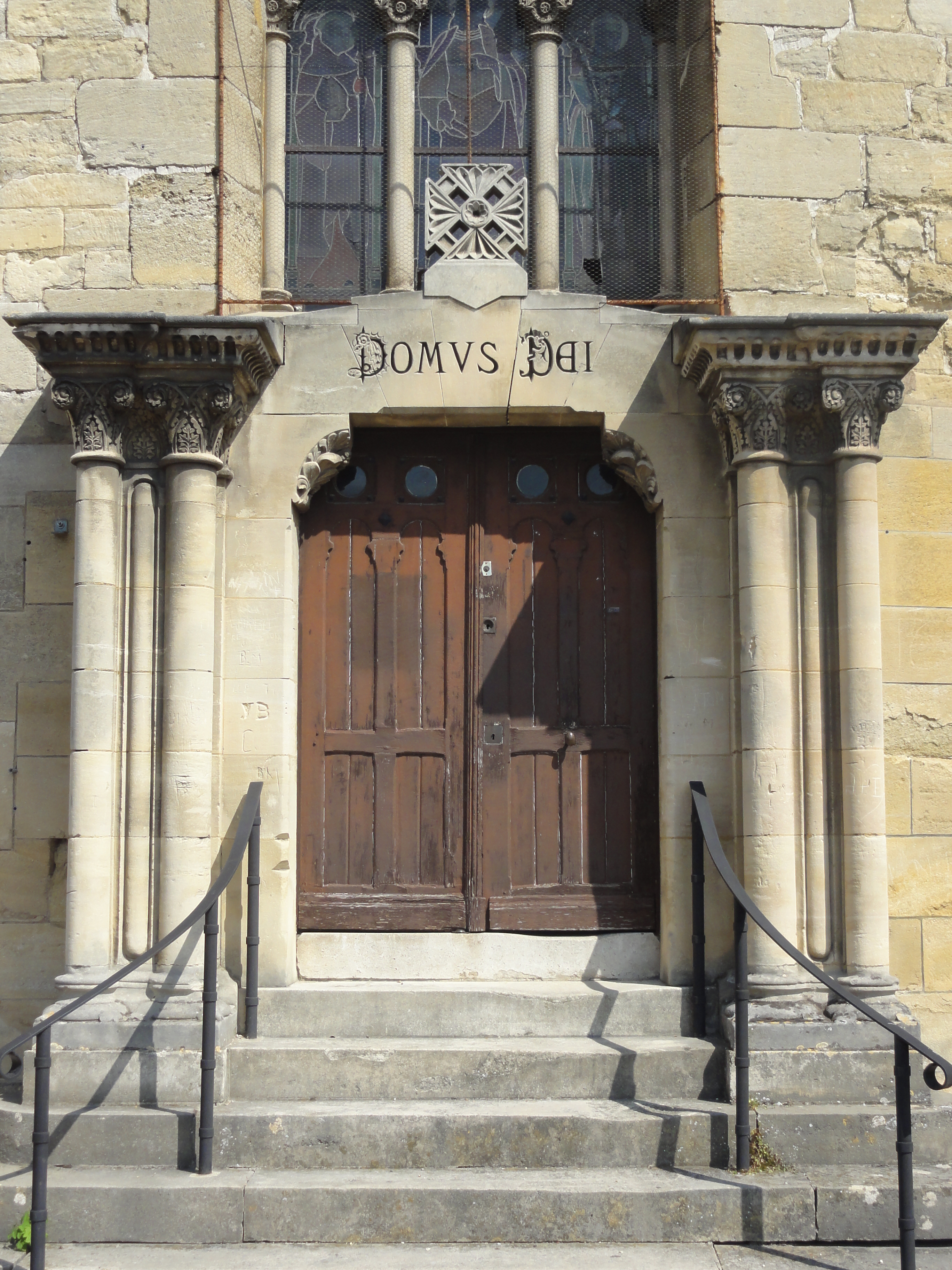 Église Saint-Nicolas de Meulan-en-Yvelines (voir titre).